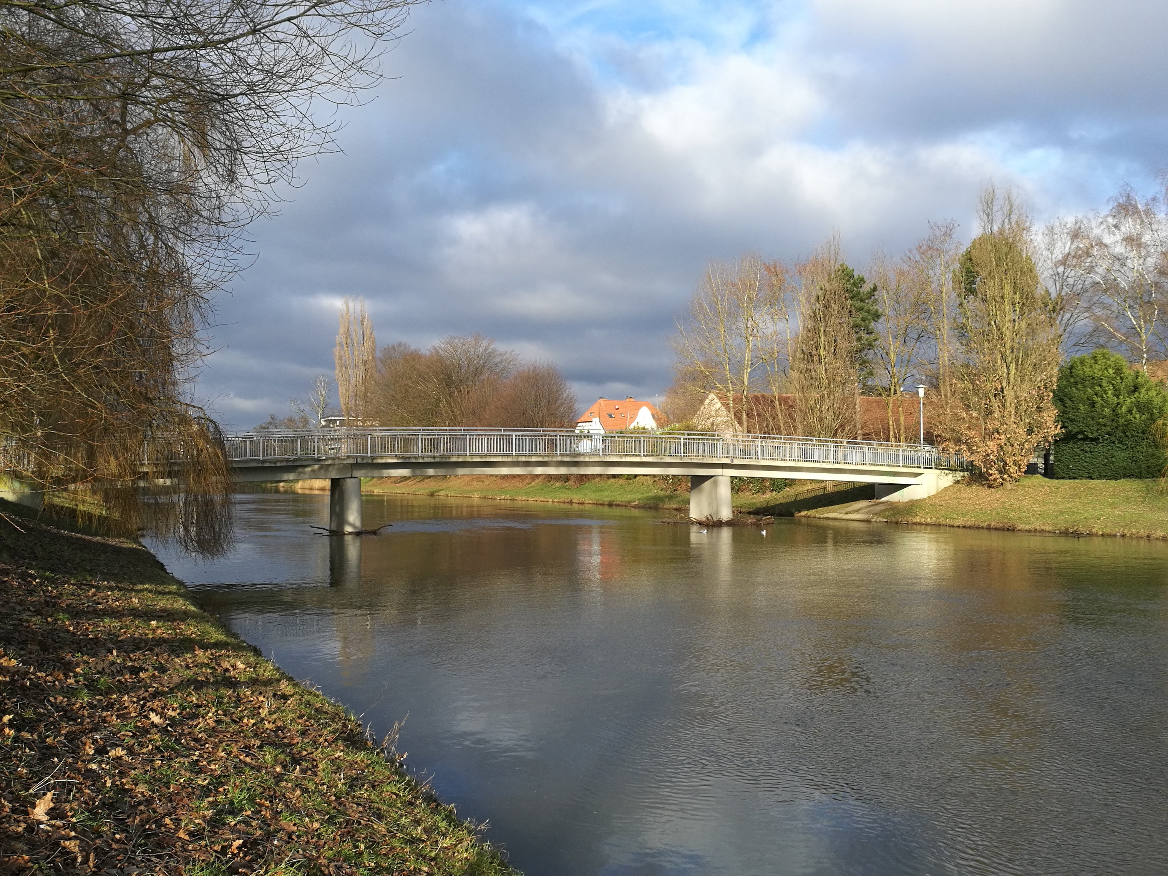 Melchiorbrücke in Nähe Bergertor